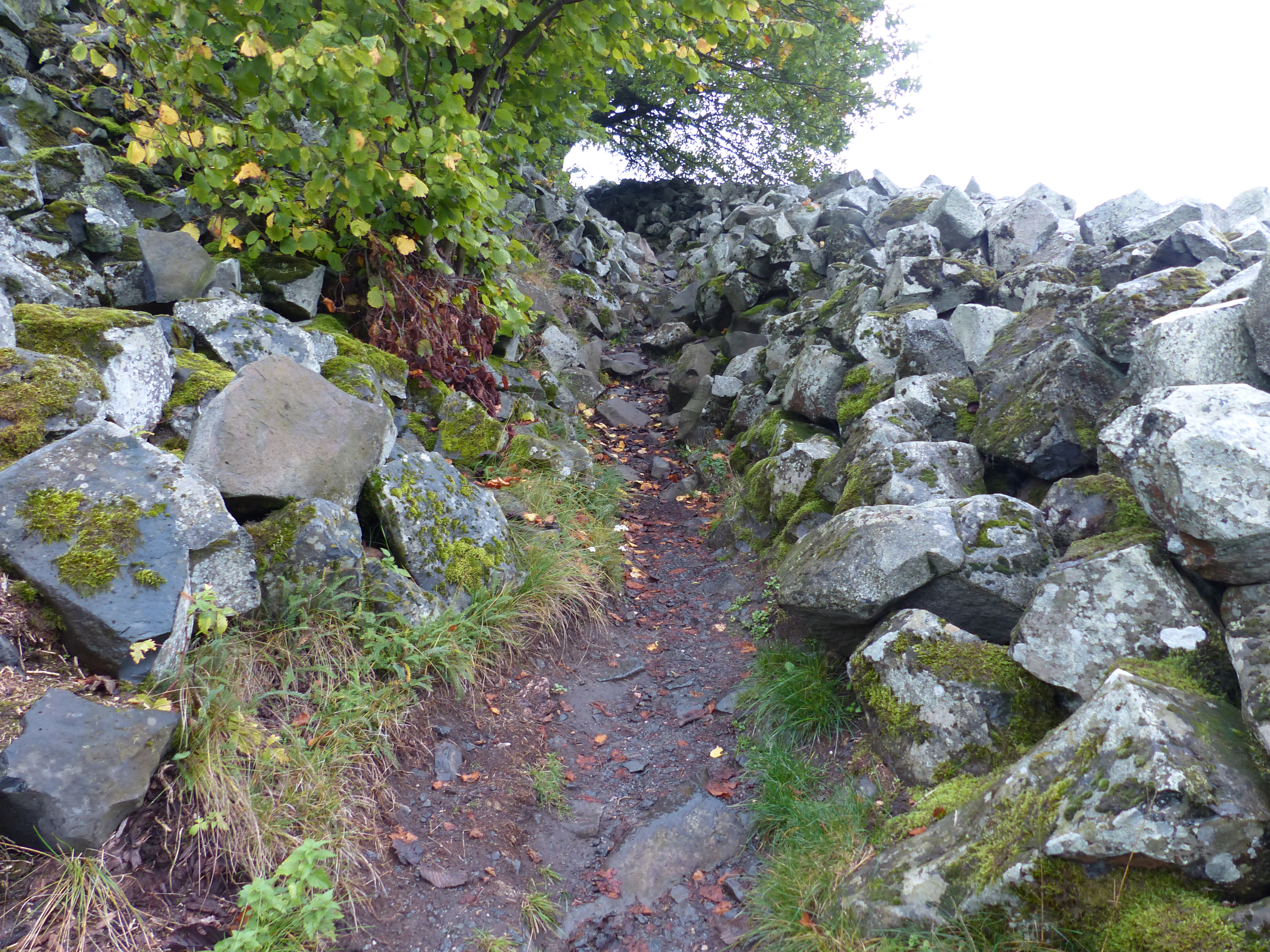 Rauher Kulm